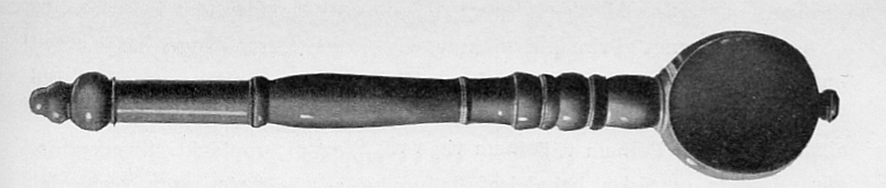 Färla från Skara gymnasium. Bild från Svenska folket genom tiderna bd.6 s.123.